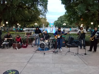 La banda de reggae Nueve Millas, dando un concierto en vivo, en la Plaza Independencia de Mendoza (2019).